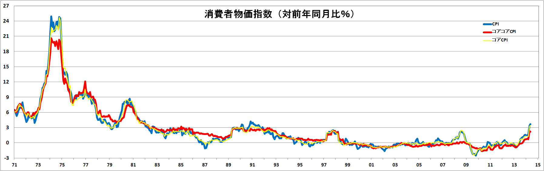 1971年から現在までの日本の消費者物価指数（前年同月比）の推移